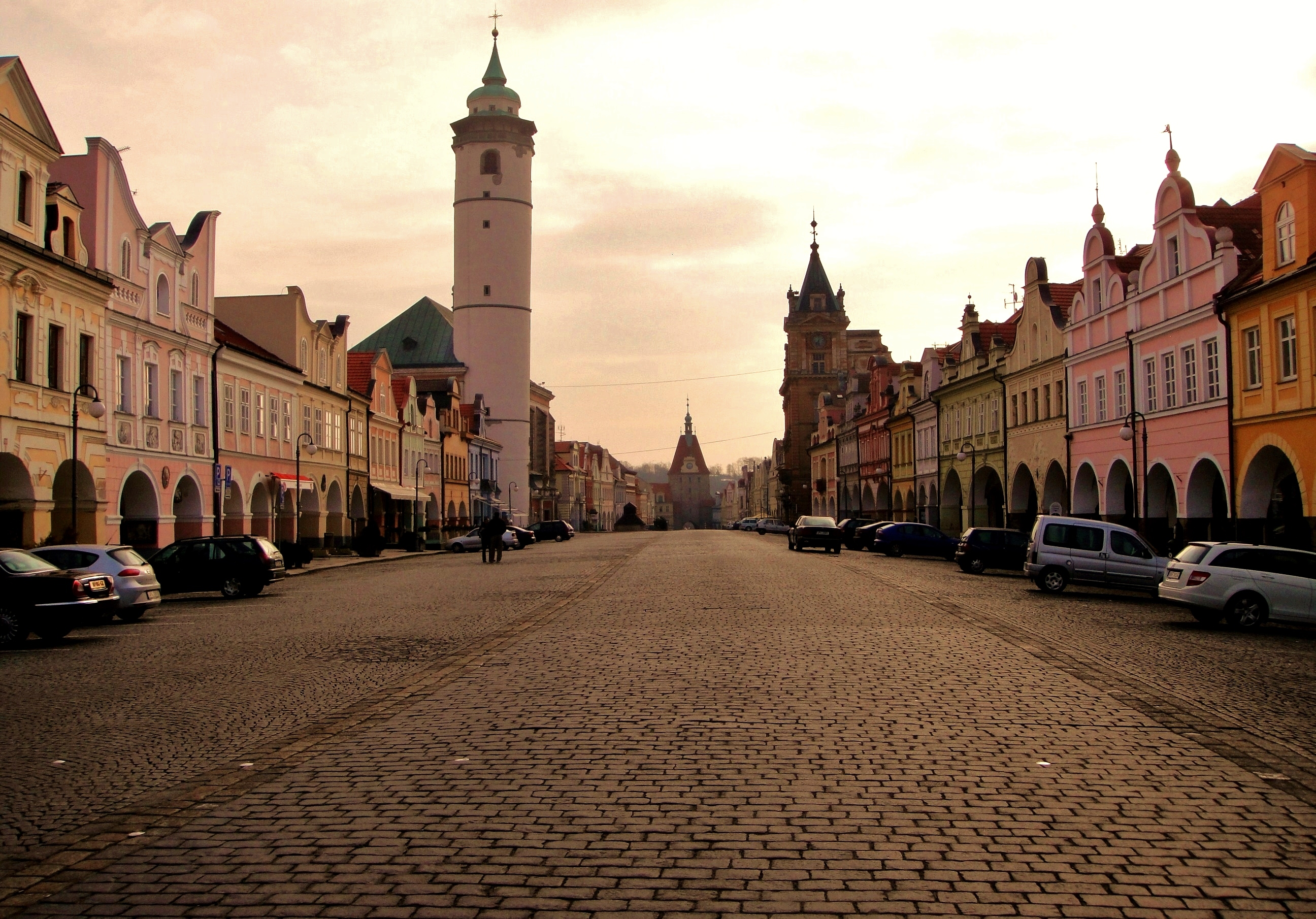 Domazlice